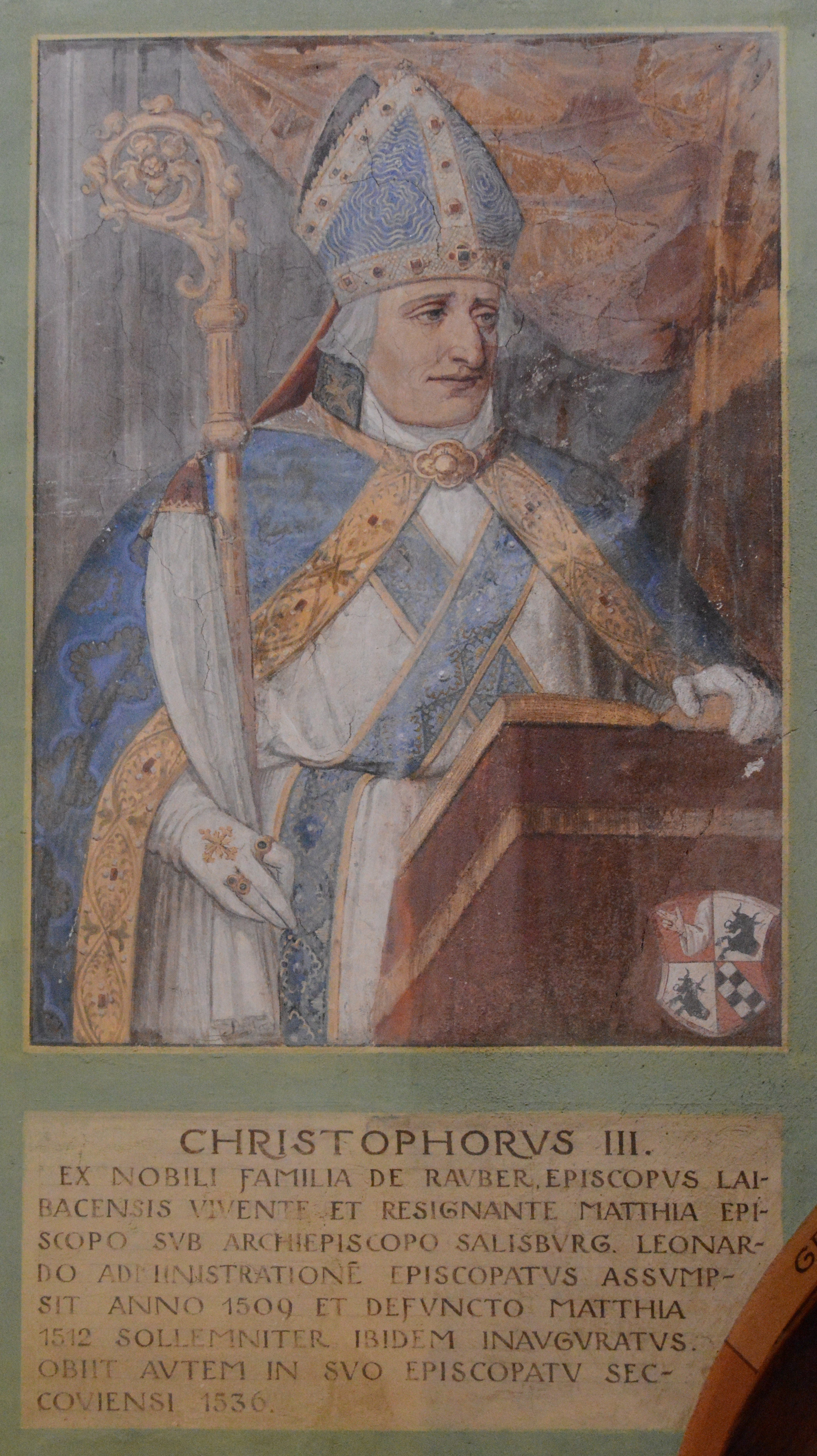 Basilika Seckau, Bischofskapelle, Halbfigurenportrait Bischof Christoph III. Rauber